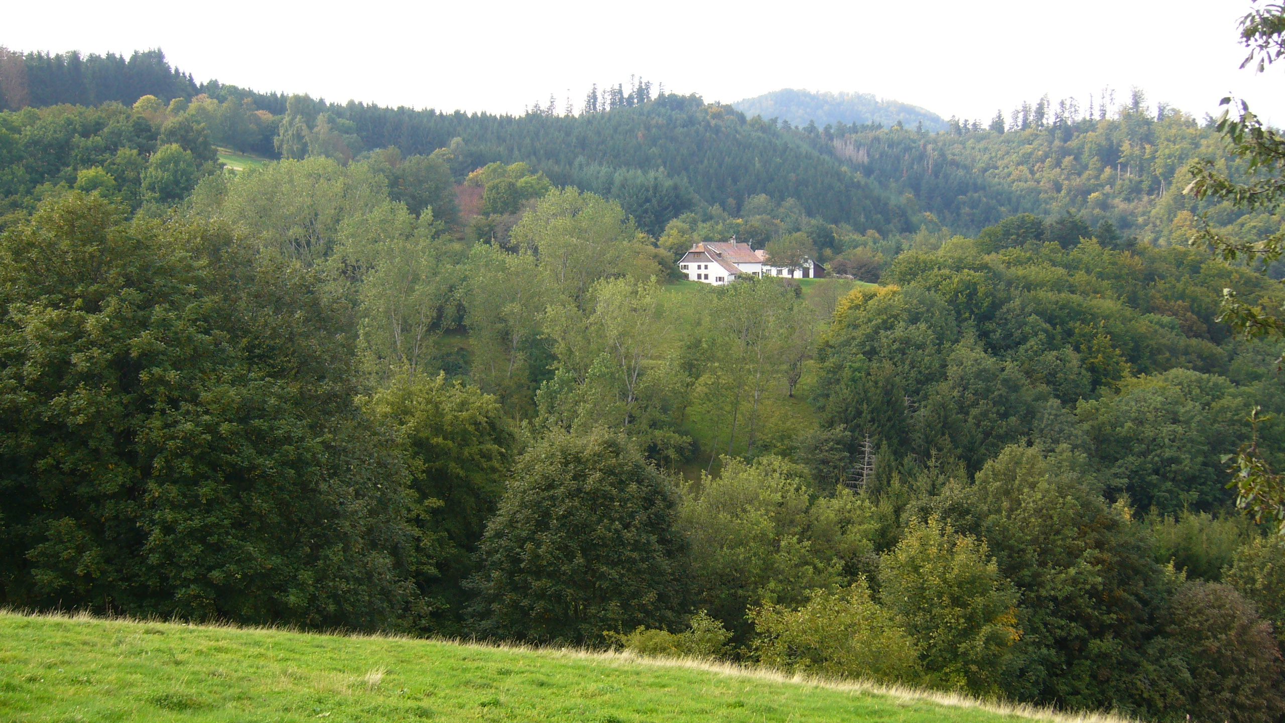 Vue partielle de la Chambrette à Rombach-le-Franc.